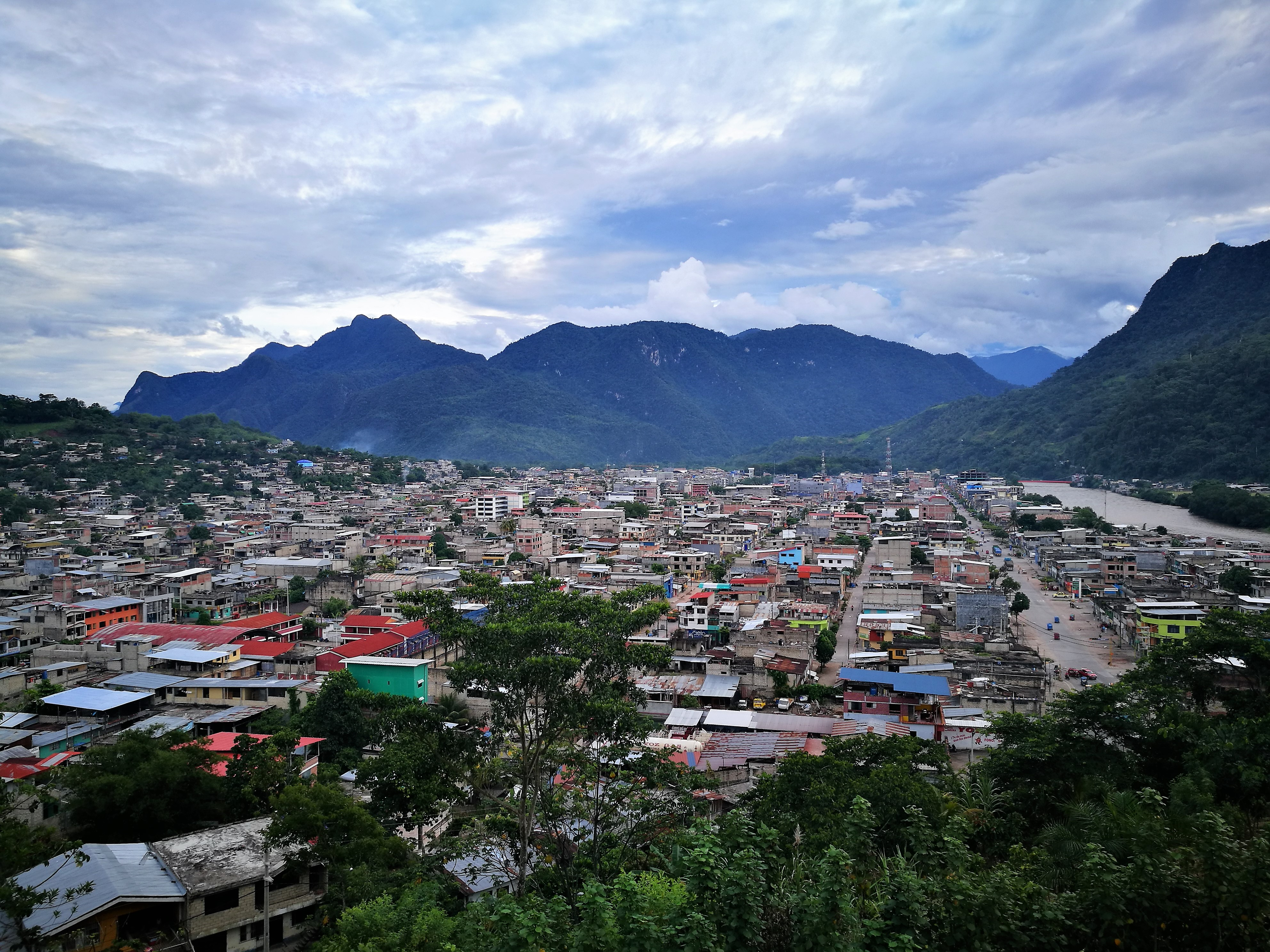 Vistes des del Mirador de la Cruz de Tingo María